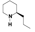 drawn by myself with BKchem